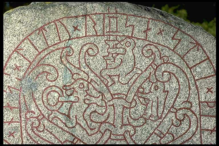 Bildframställning ur Sigurdssagan. Inskriften lyder: Vidbjörn och Karlung och Ärenger och Nase lät resa denna sten efter Ärenbjörn sin käcke fader. Motiv: U1163 Drävle Nyckelord: Runor Kategori: Runristning/runsten Bildframställning ur Sigurdssagan. Inskriften lyder: Vidbjörn och Karlung och Ärenger och Nase lät resa denna sten efter Ärenbjörn sin käcke fader.